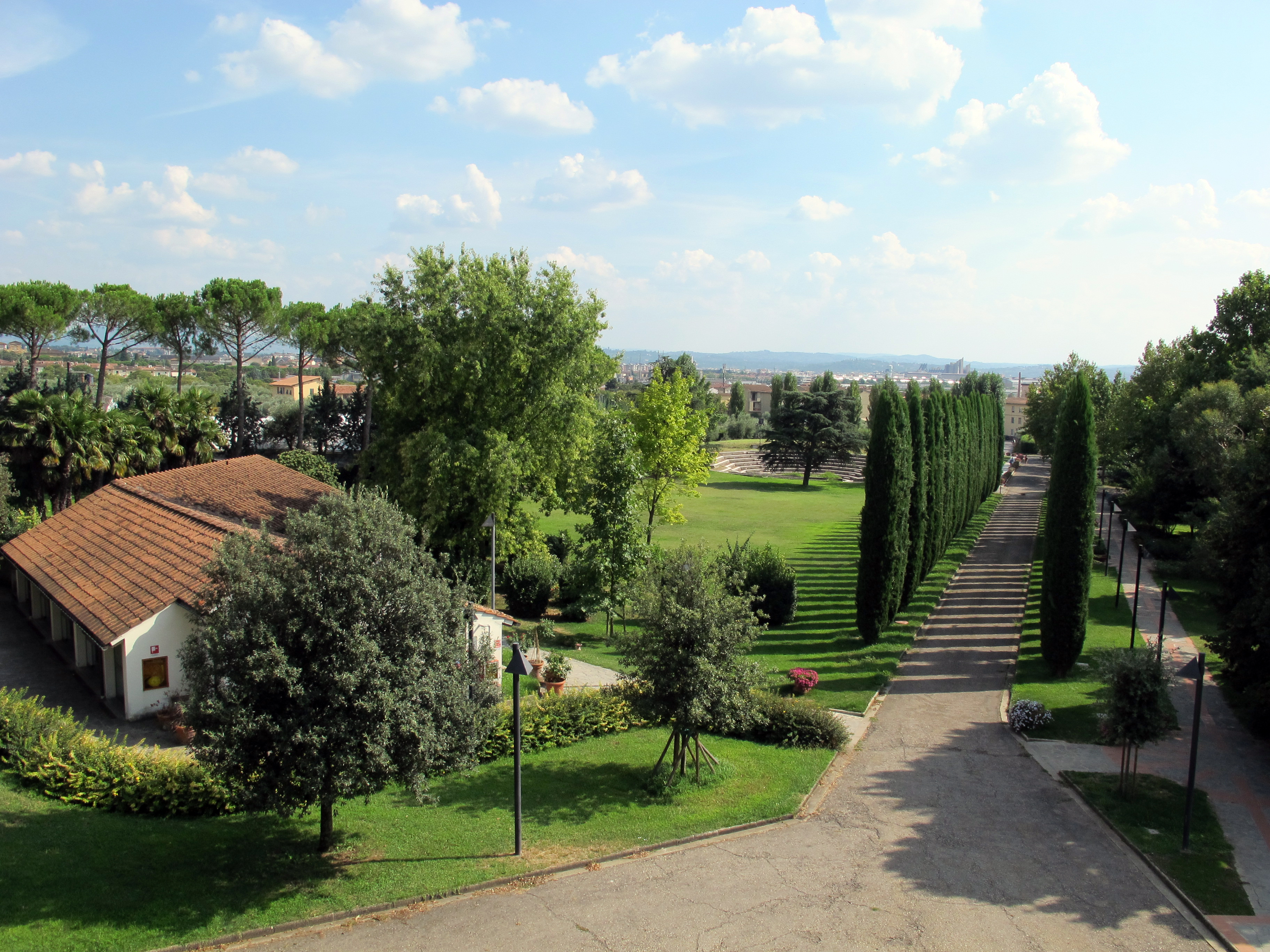 Villa Le Brache, Firenze (sede della Soka Gakkai)